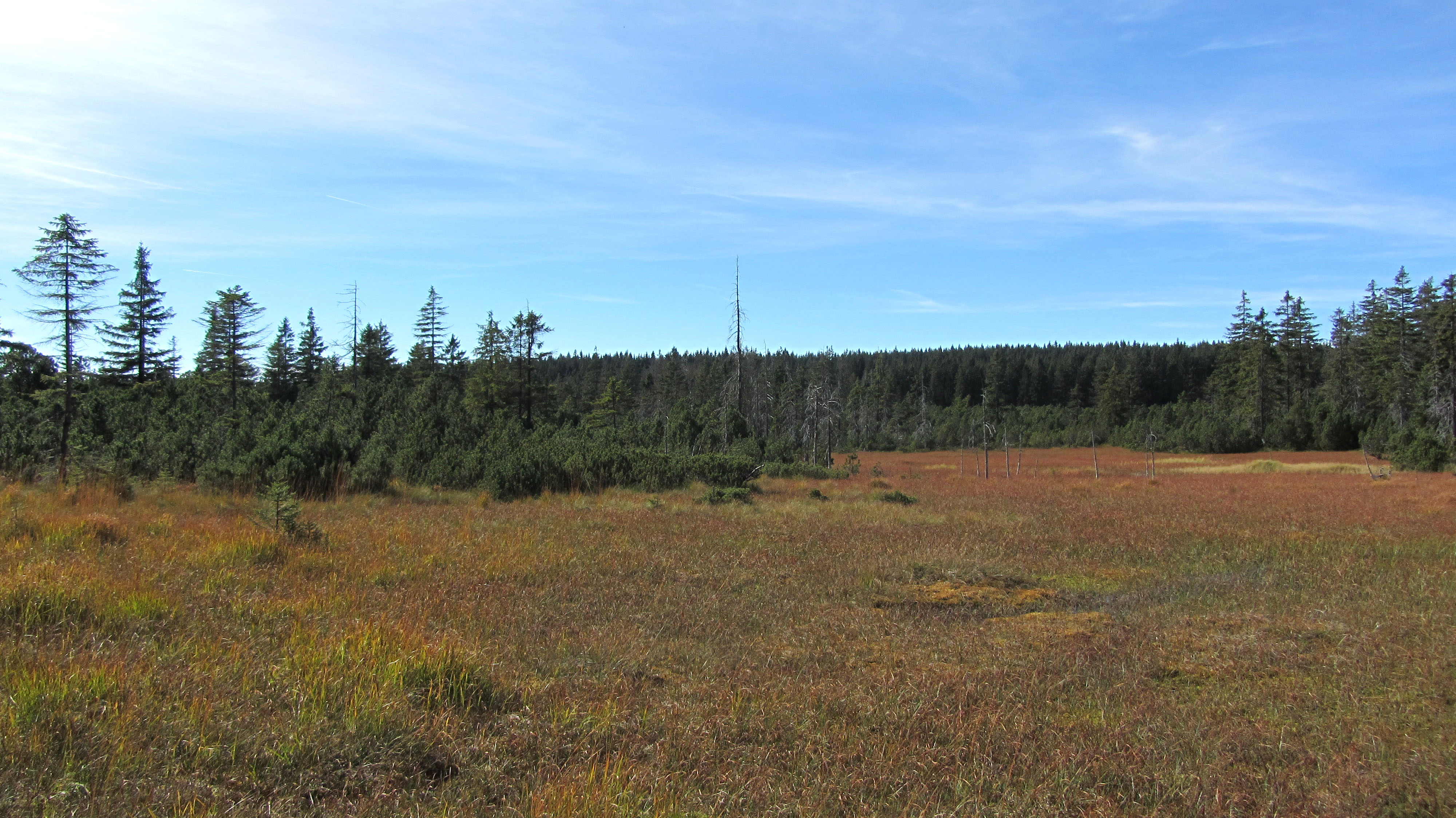 Das Naturschutzgebiet "Großer Kranichsee" in der Nähe von Carlsfeld bei Eibenstock, Westerzgebirge.